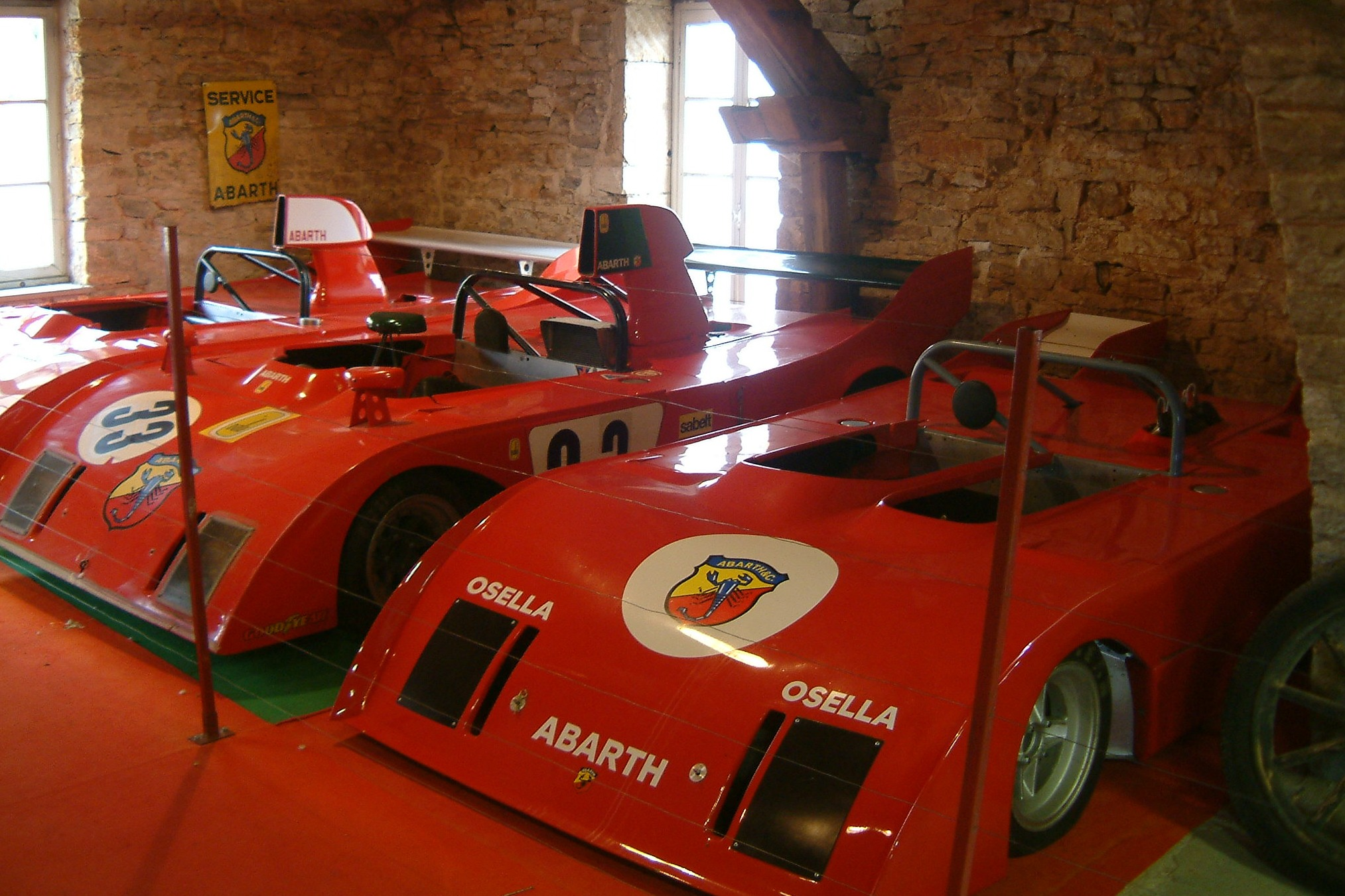 Château de Savigny-lès-Beaune, Bourgogne, FRANCE